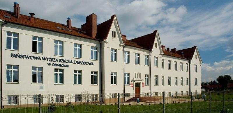 Rittmeister-Witold-Pilecki-Hochschule, Hauptgebäude